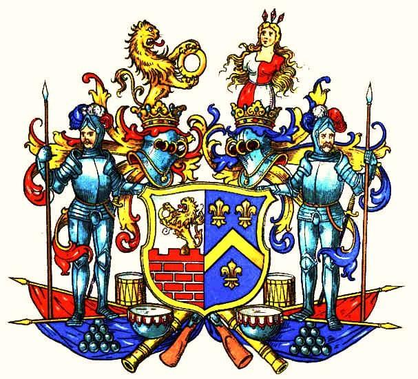 Wappen der Freiherren von der Goltz (neumärkischer Uradel), wie es seit Ende des 17. Jh. geführt wird